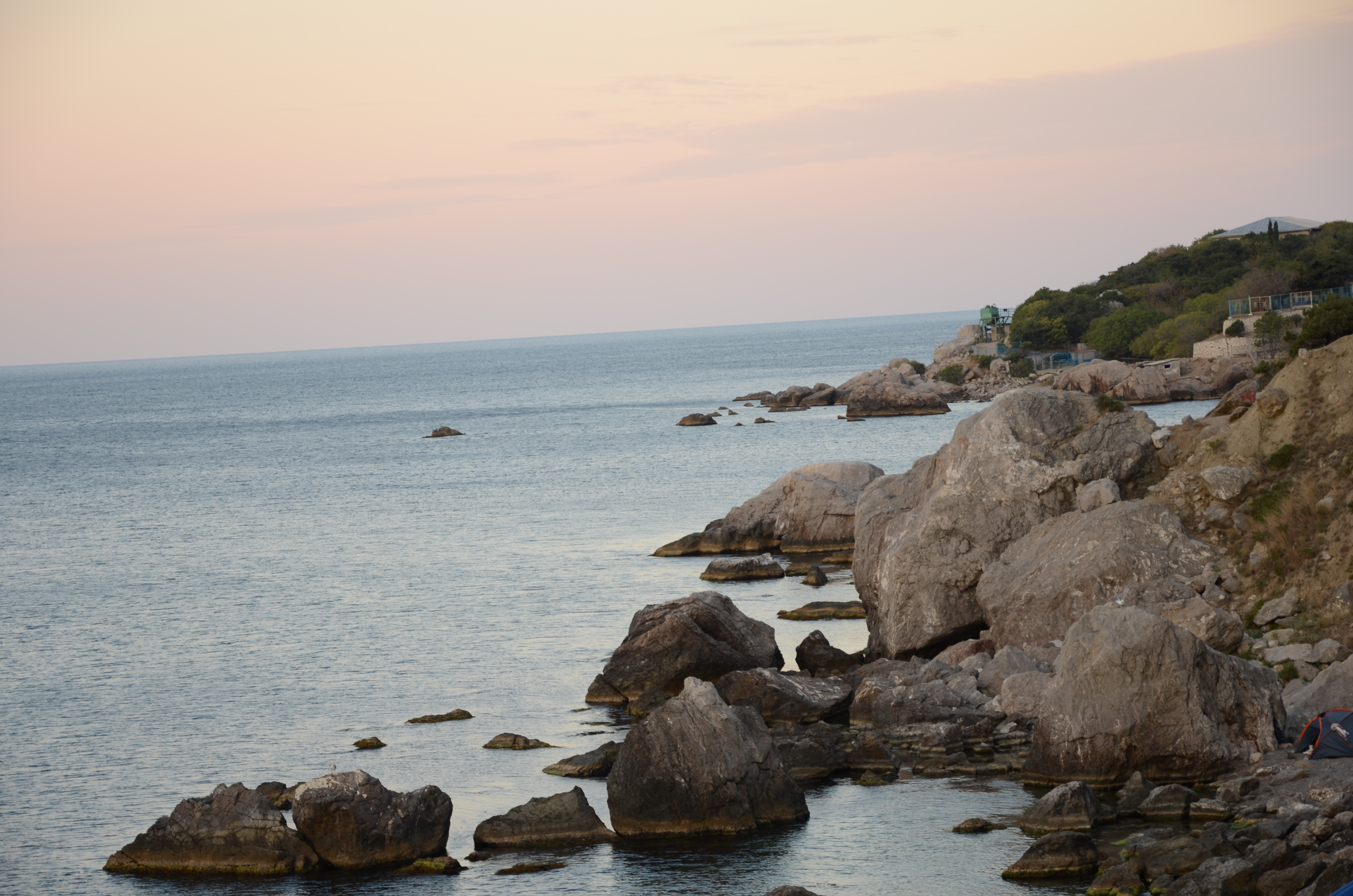 Батильманский_пляж